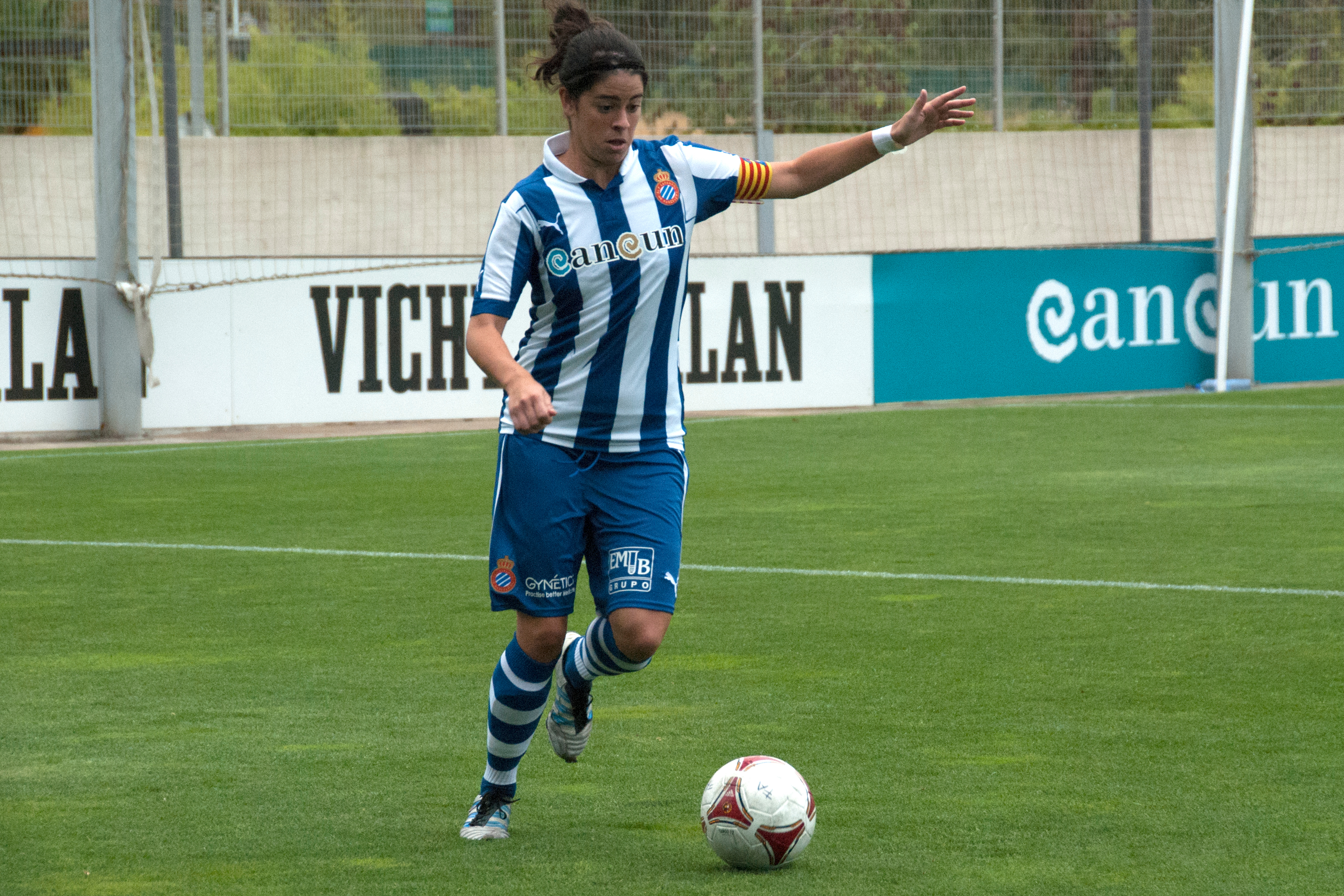 derbi català.